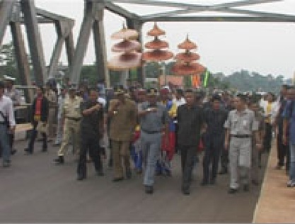 Peresmian Jalan Juanda Kota Depok